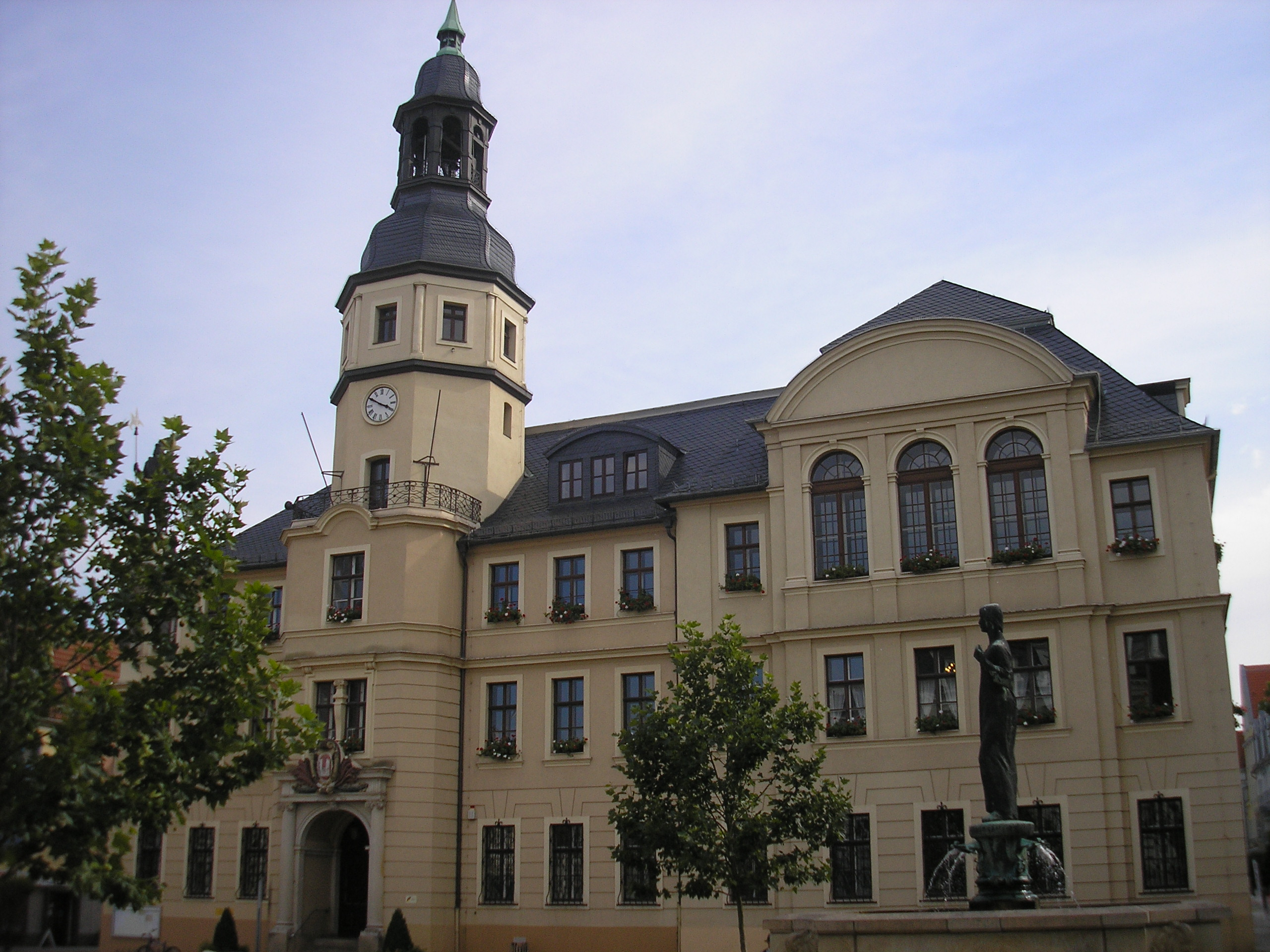 Das Rathaus in Crimmitschau (Sachsen).